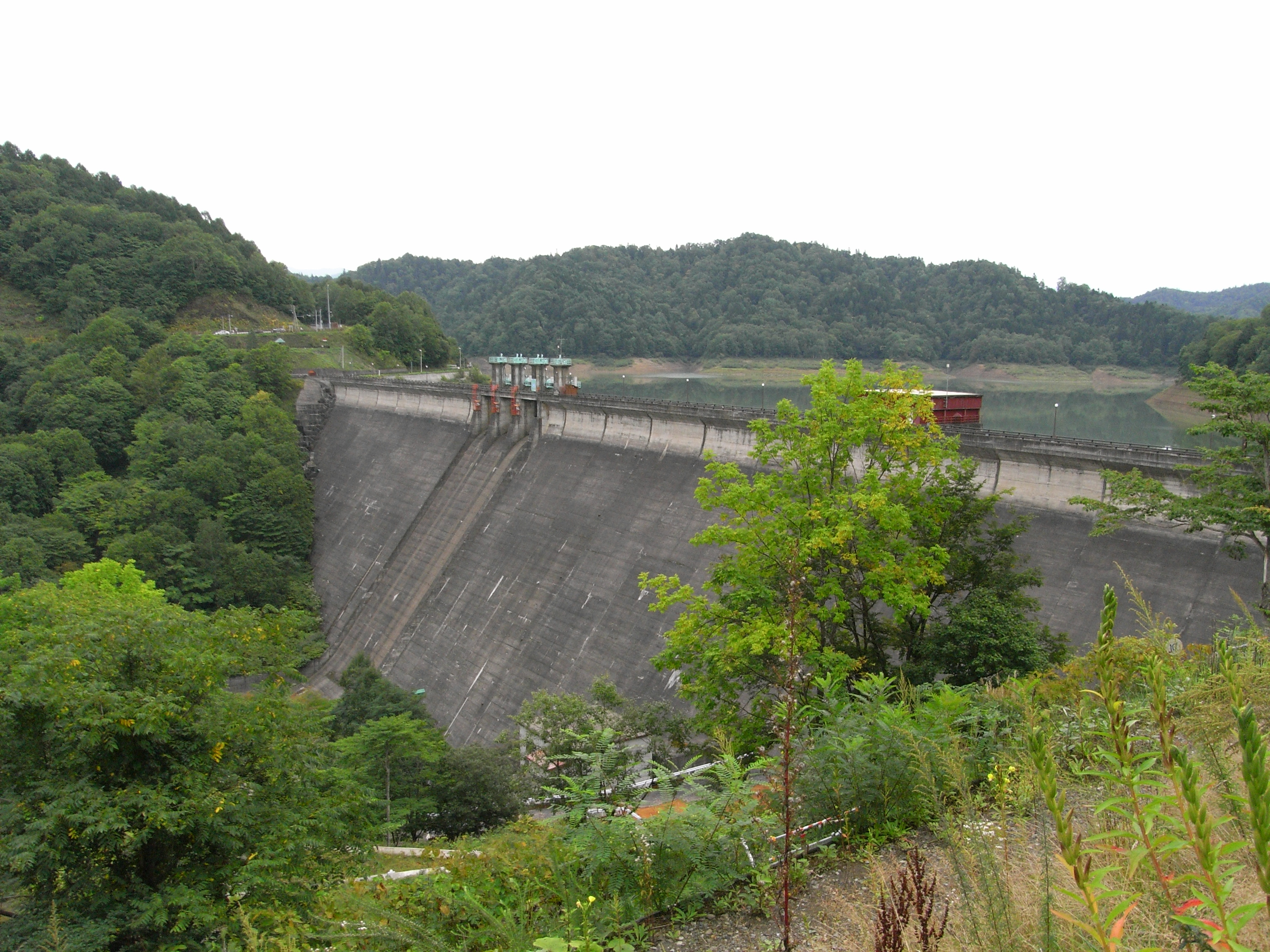 Dam